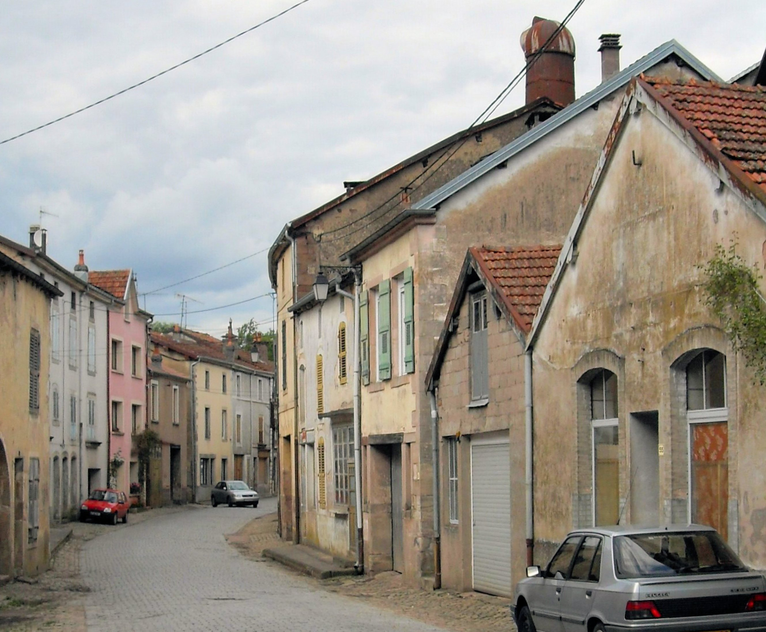 Fontenoy-le-Château, Grand Rue